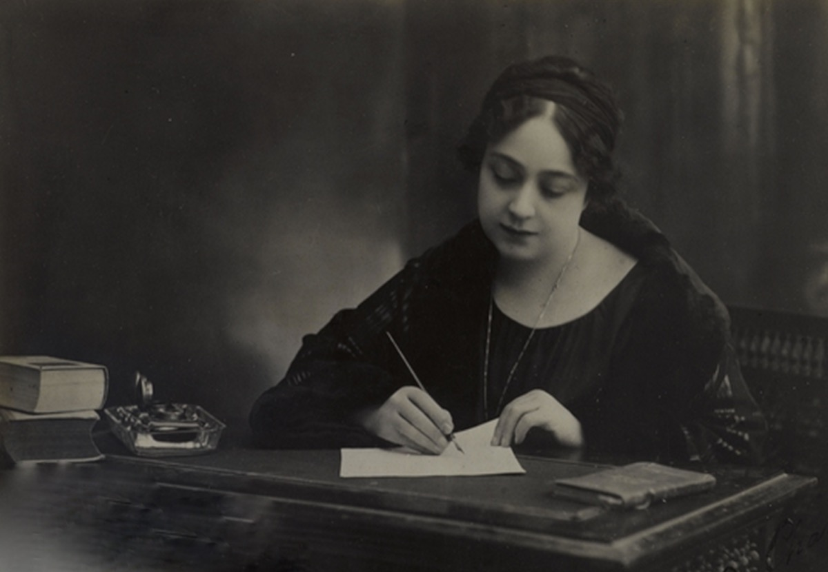 Huda Sha'arawi (o Hoda Shaarawi) (en árabe: هدى شعراوي , Hudá Sha‘arāwī) (Menia, Egipto, 23 de junio de 1879 – El Cairo, 12 de diciembre de 1947) fue una de las pioneras del movimiento feminista egipcio y árabe,1​2​ nacionalista y fundadora de la Unión Feminista Egipcia.